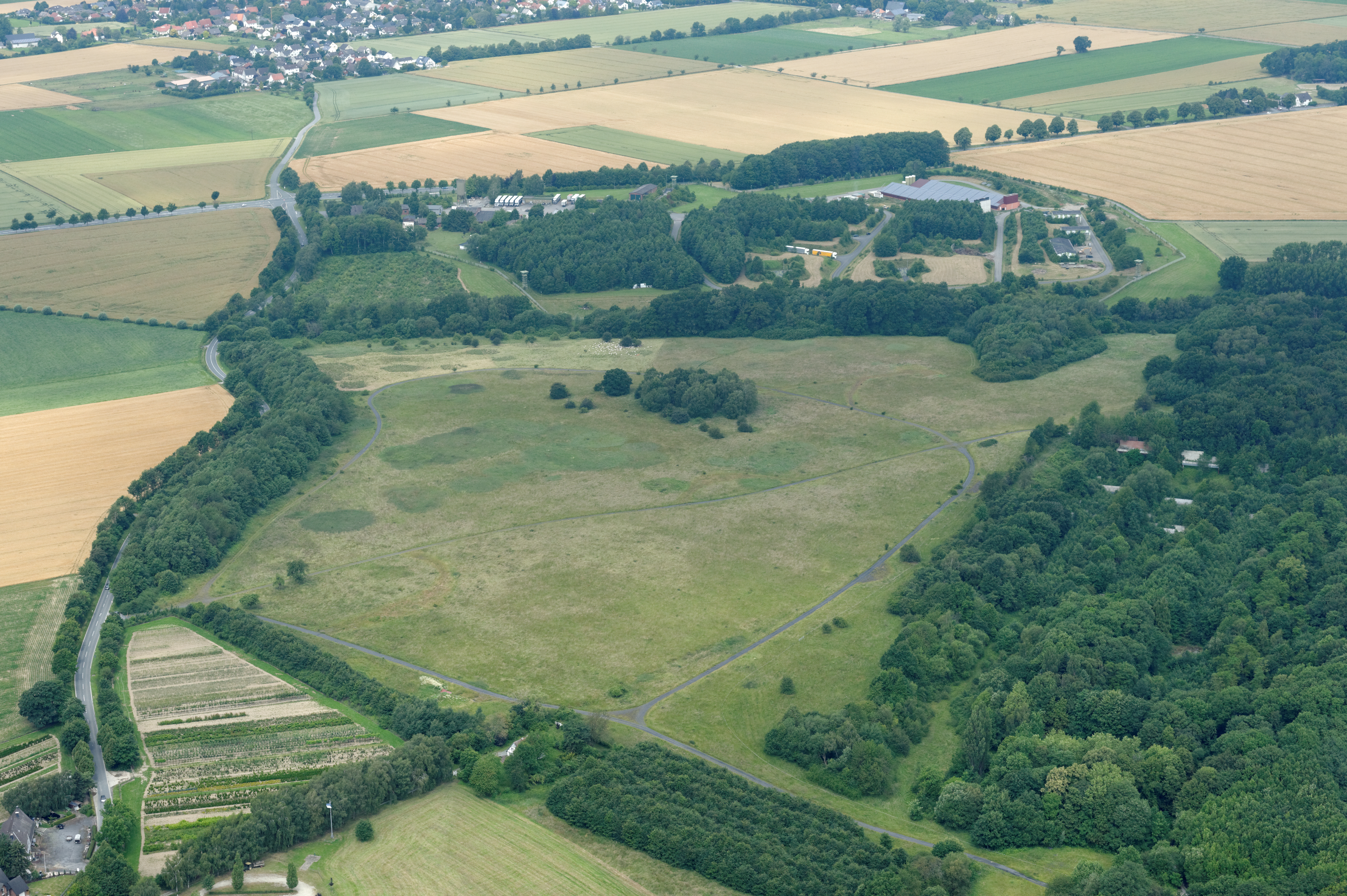 Fotoflug Sauerland-Nord. Ehemaliger Standort der Flugabwehrraketengruppe 21 zwischen Deiringsen und Büecke, Naturschutzgebiet Standortübungsplatz bei Büecke, Bundesstraße 229, oben Deiringsen, Blickrichtung Nordwest.